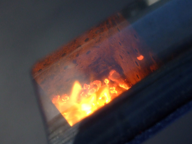 FF式ペレットストーブの燃焼部分。投入された木質ペレットは中央の燃焼皿にて燃焼する。